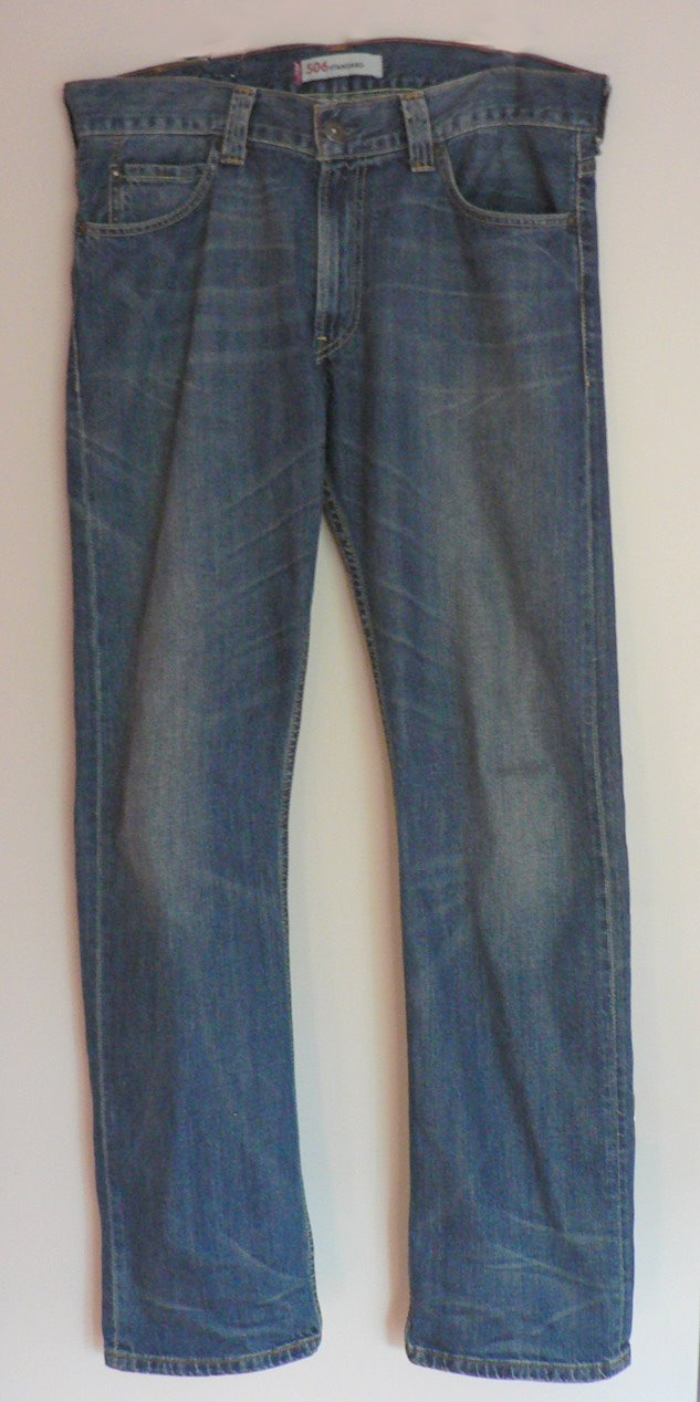 Levi's 506 jeans